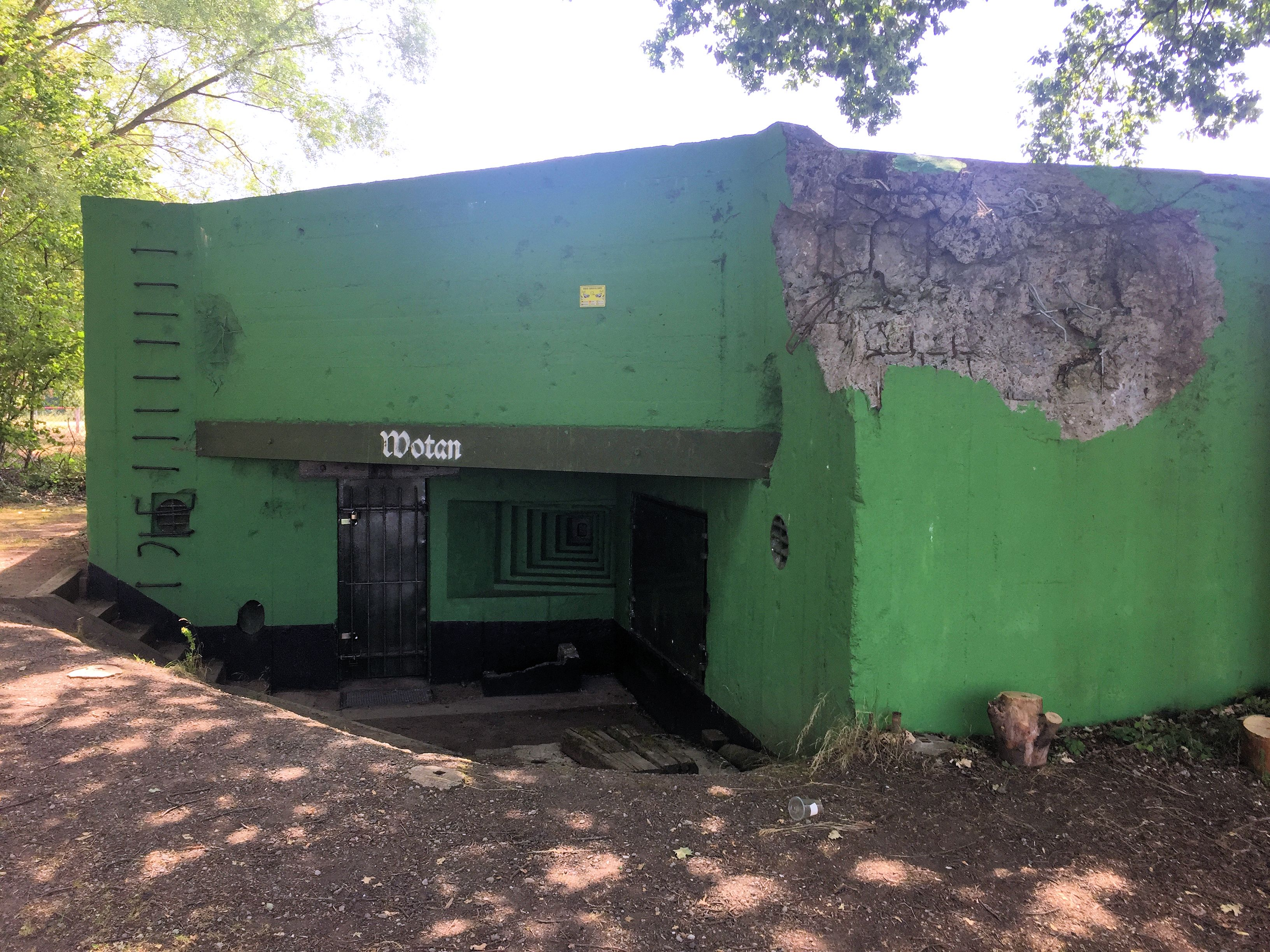 Ehemaliger deutscher Bunker "Wotan" bei Spichern / Frankreich